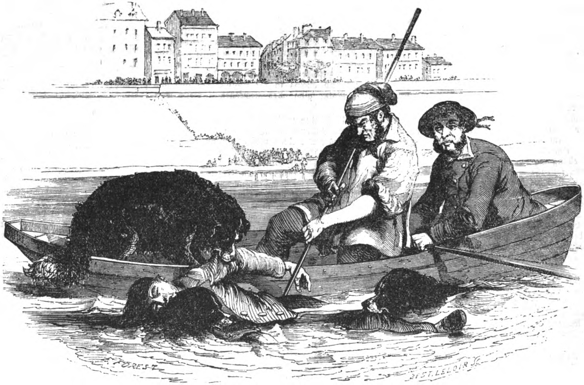 Neufundländer werden zur Rettung Ertrinkender abgerichtet. Originalbildtext: „Abrichtung von Neufundländer Hunden zur Rettung Ertrinkender“